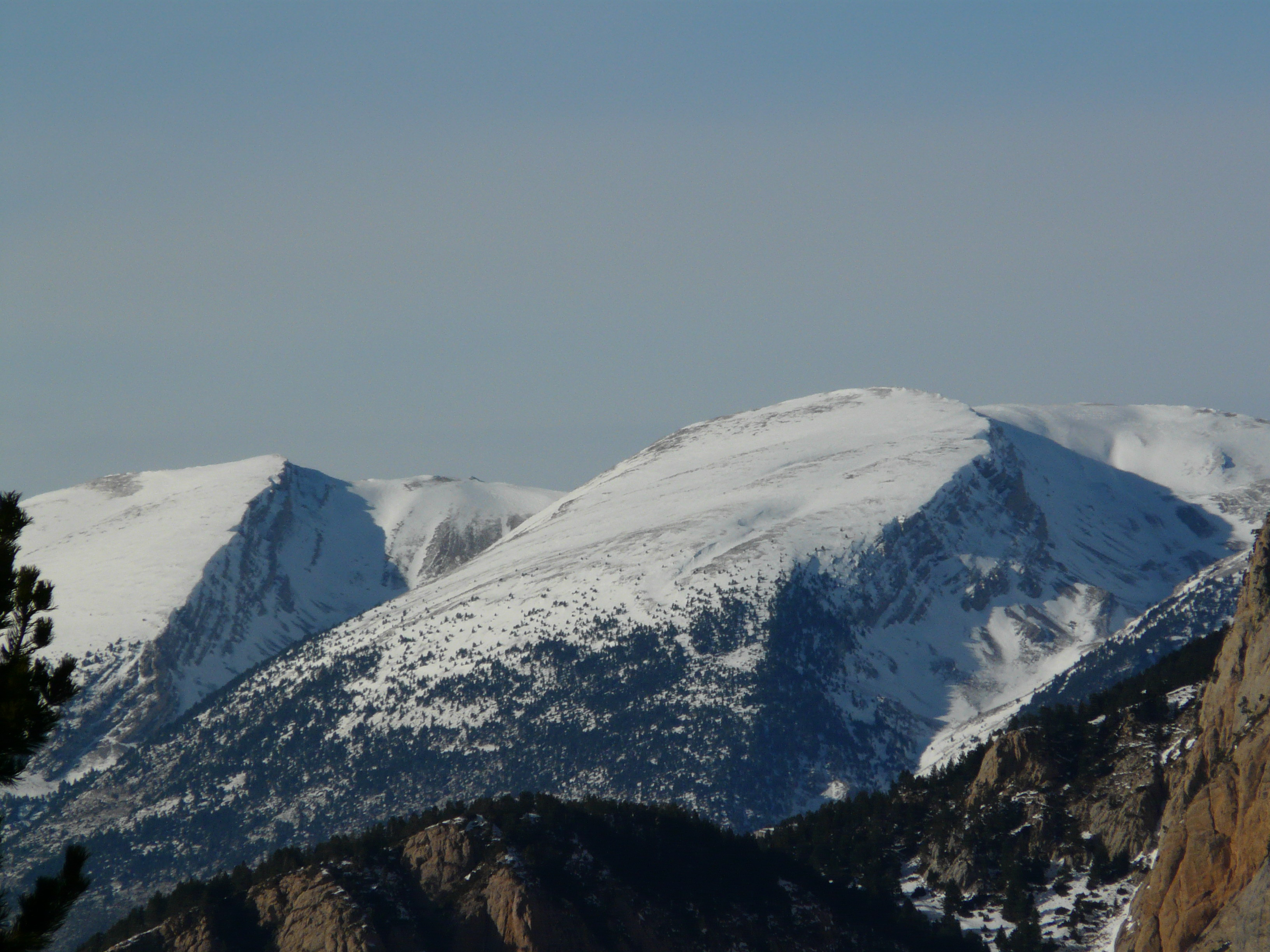 El Vulturó vist des dels Rasos de Peguera